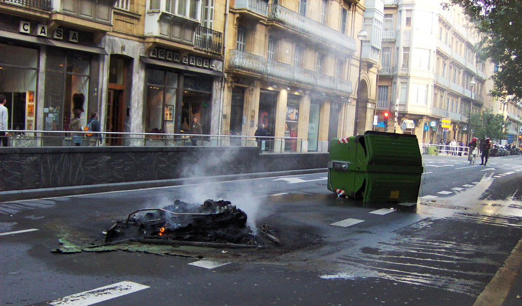 Kontenedoreak erreta Donostiako Urbieta kalean.